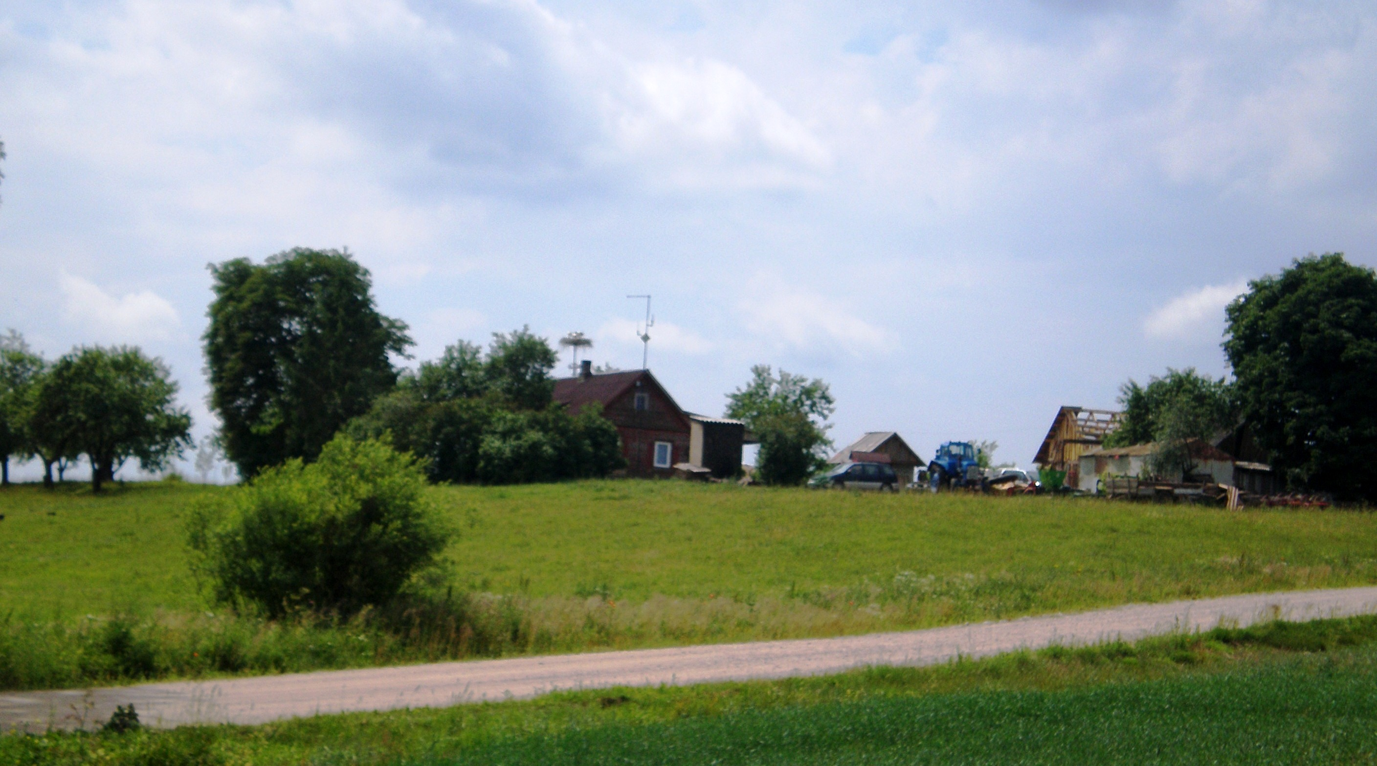 Skaistkalnis, Panevėžio raj.